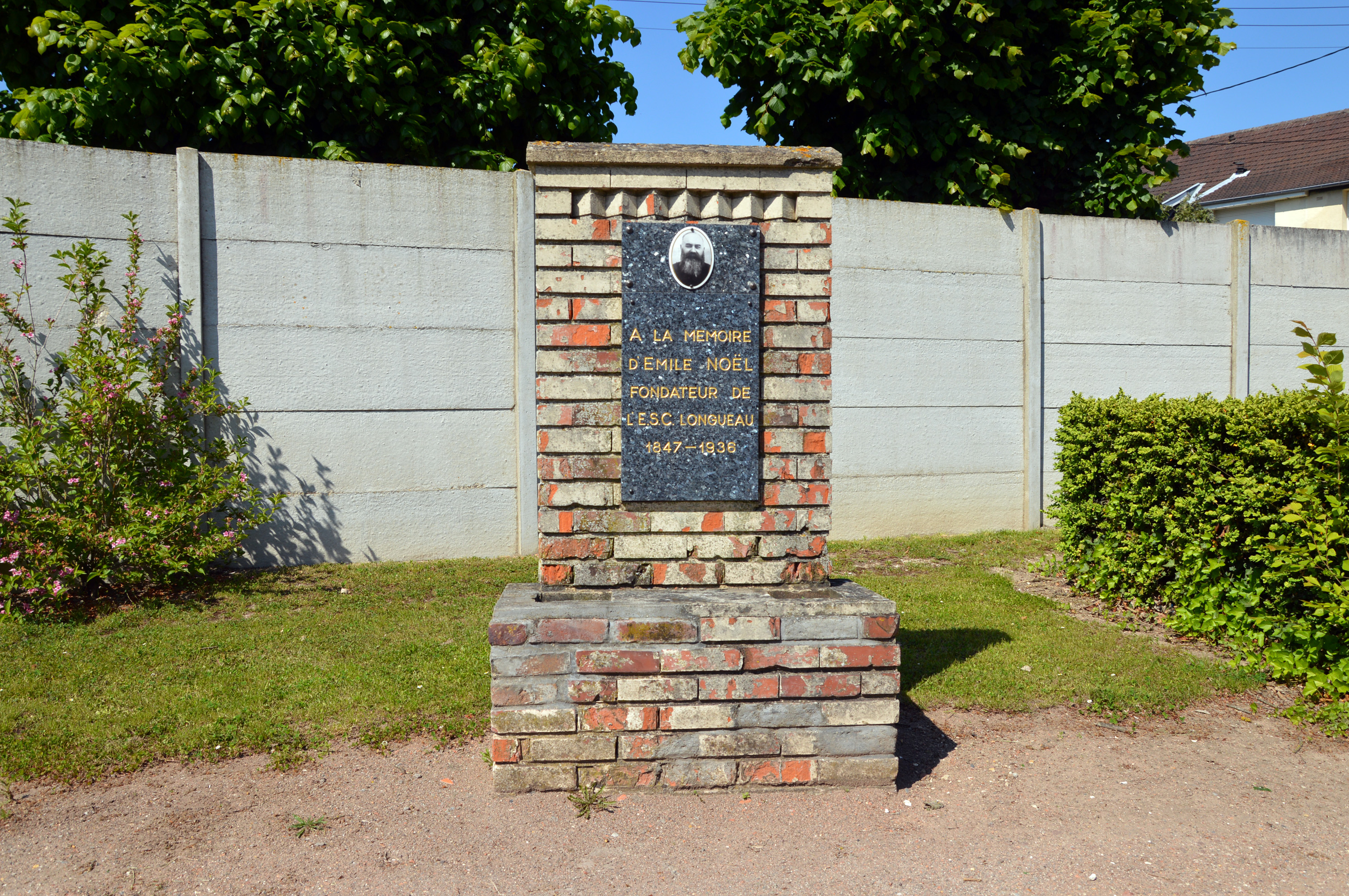 Stele hommage au fondateur de l'ESCLongueau